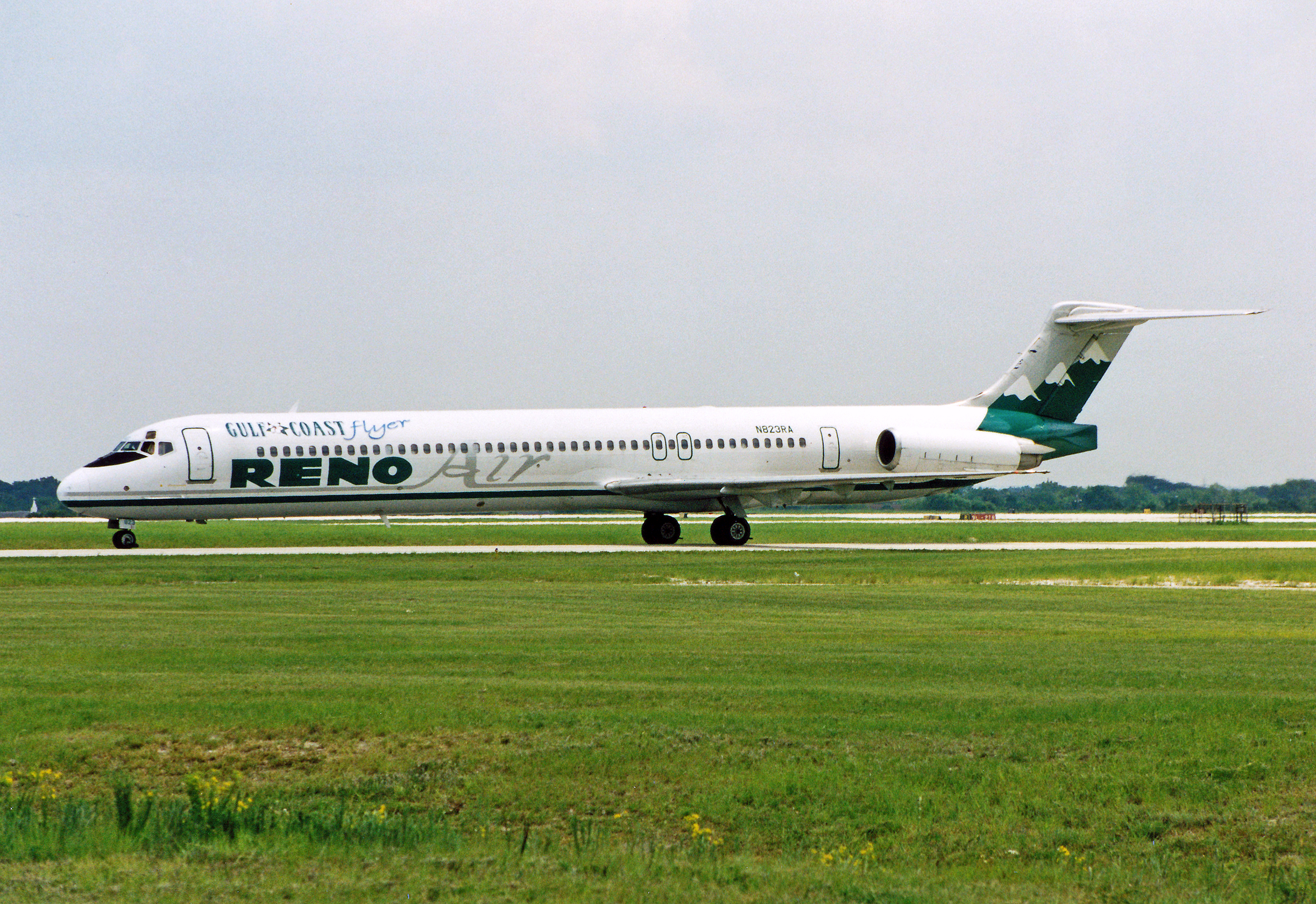 A Reno Air MD-82